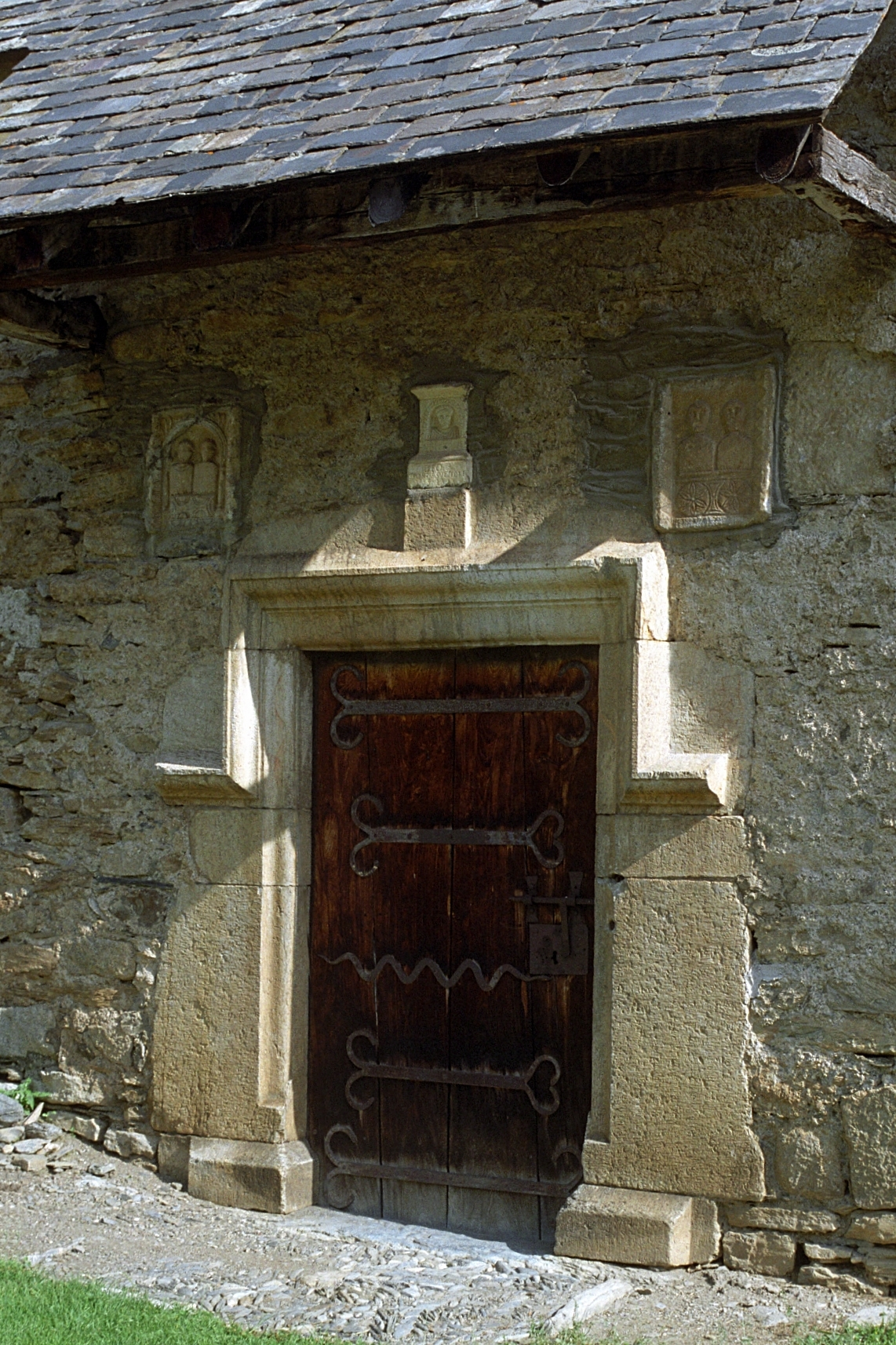 France - Pyrénées - Comminges - Chapelle Saint-Pé de la Moraine